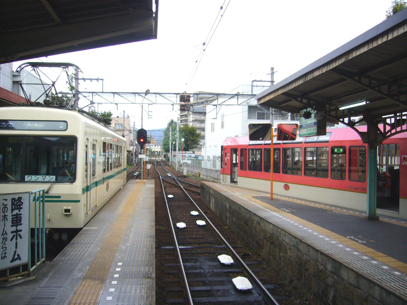 叡山電鉄叡山本線出町柳駅の構内。左の1番線には700系の八瀬比叡山口駅行が、右の3番線には900系（きらら）の鞍馬駅行が停車中。正面の上屋がないホームは2・3番線用の降車専用ホーム。2007年10月13日に投稿者が撮影。